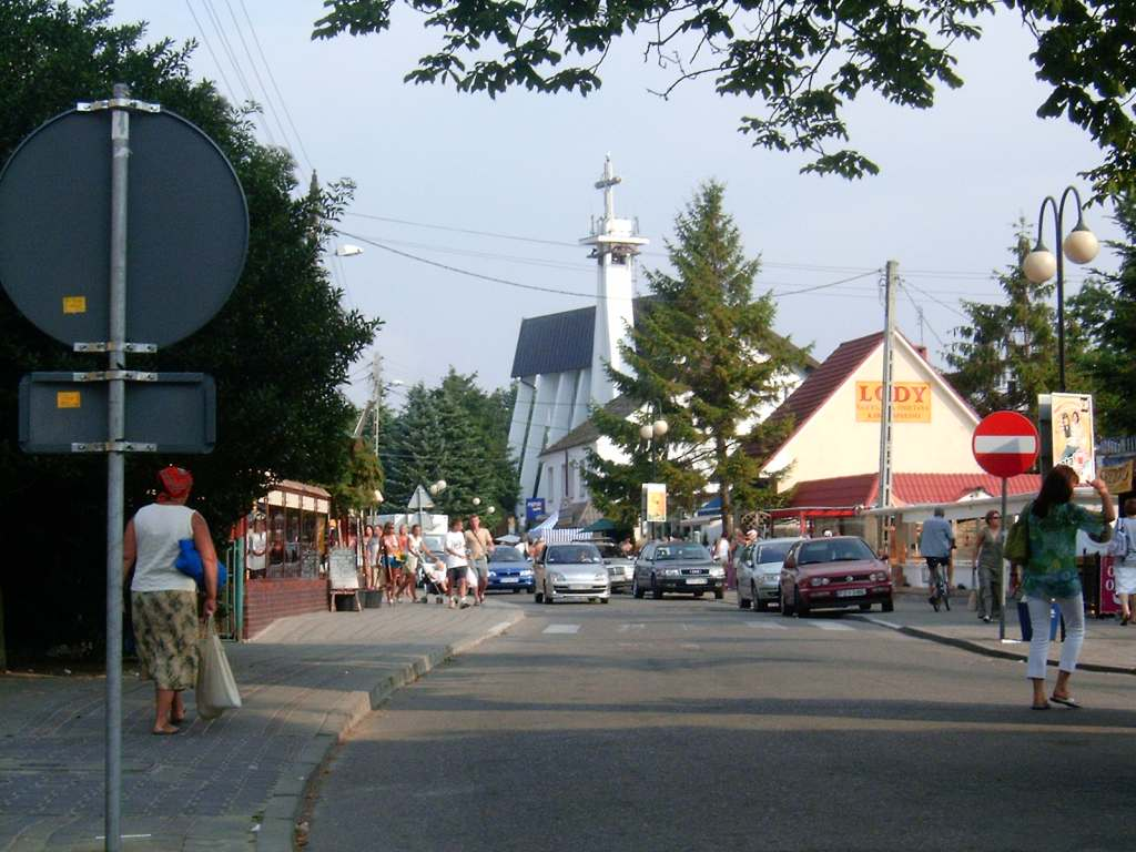 Rewal - kościół